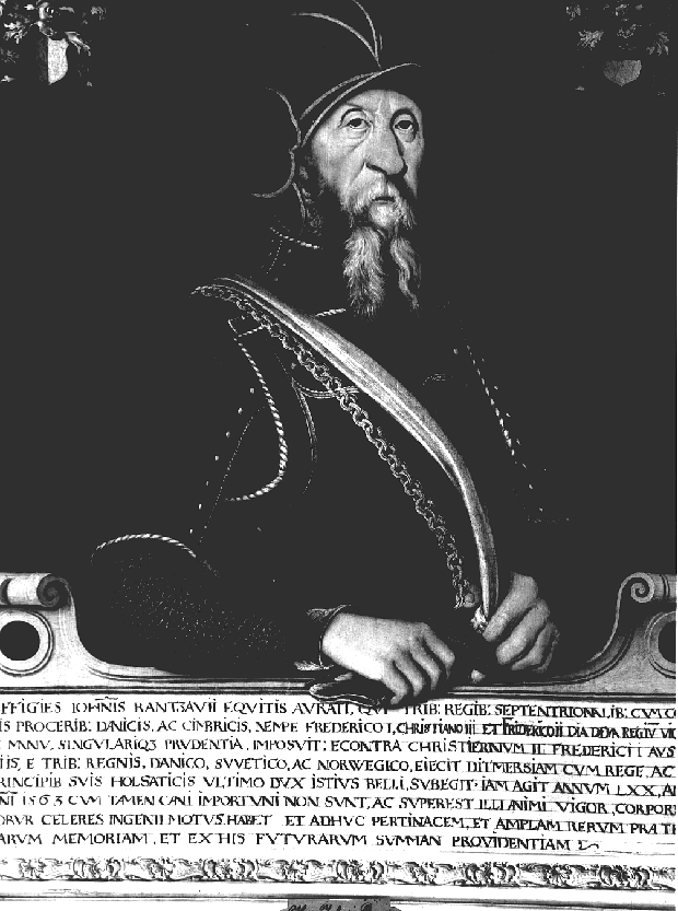 Johann Rantzau (1492-1565), Feldherr